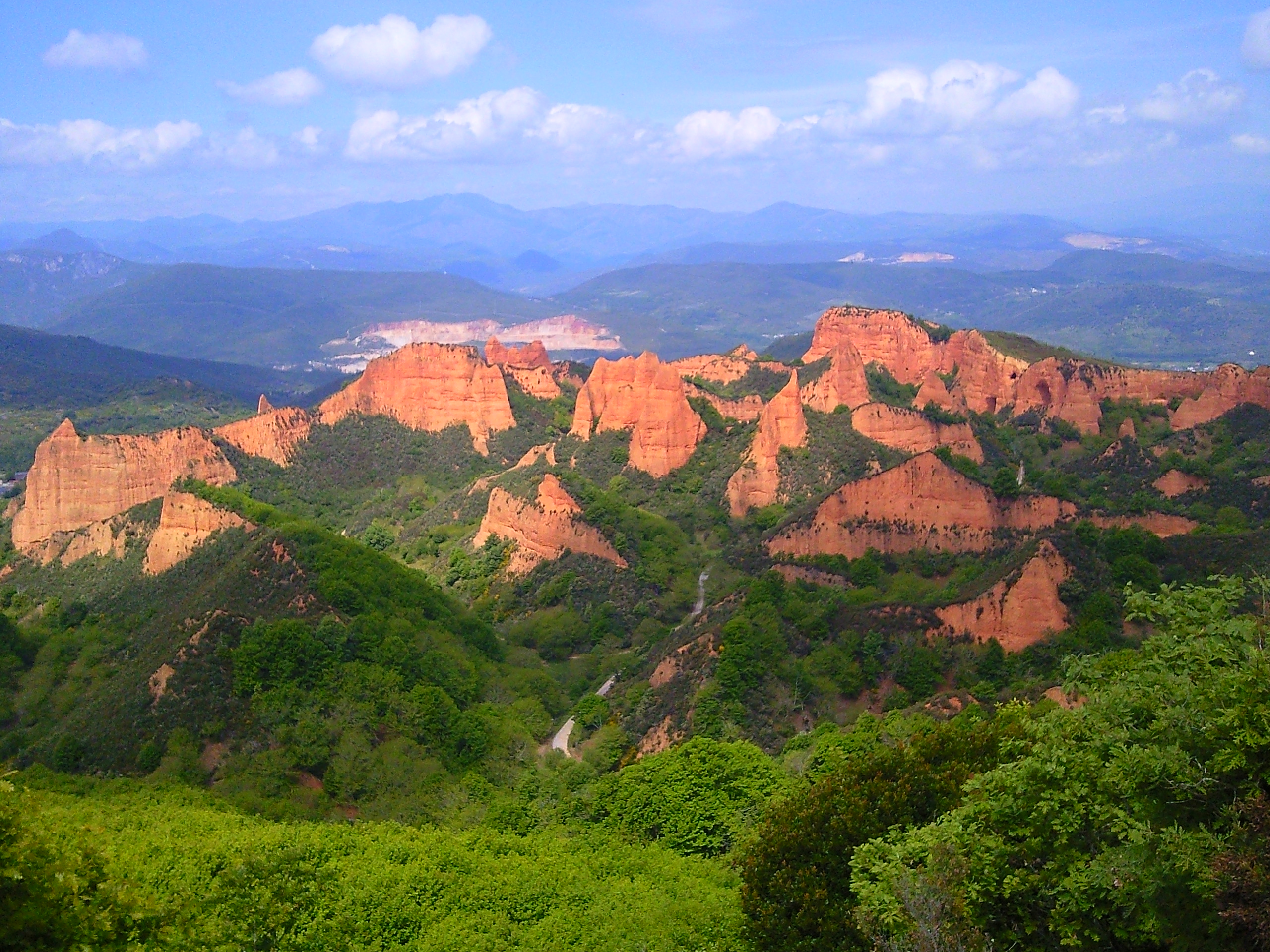 Las Médulas